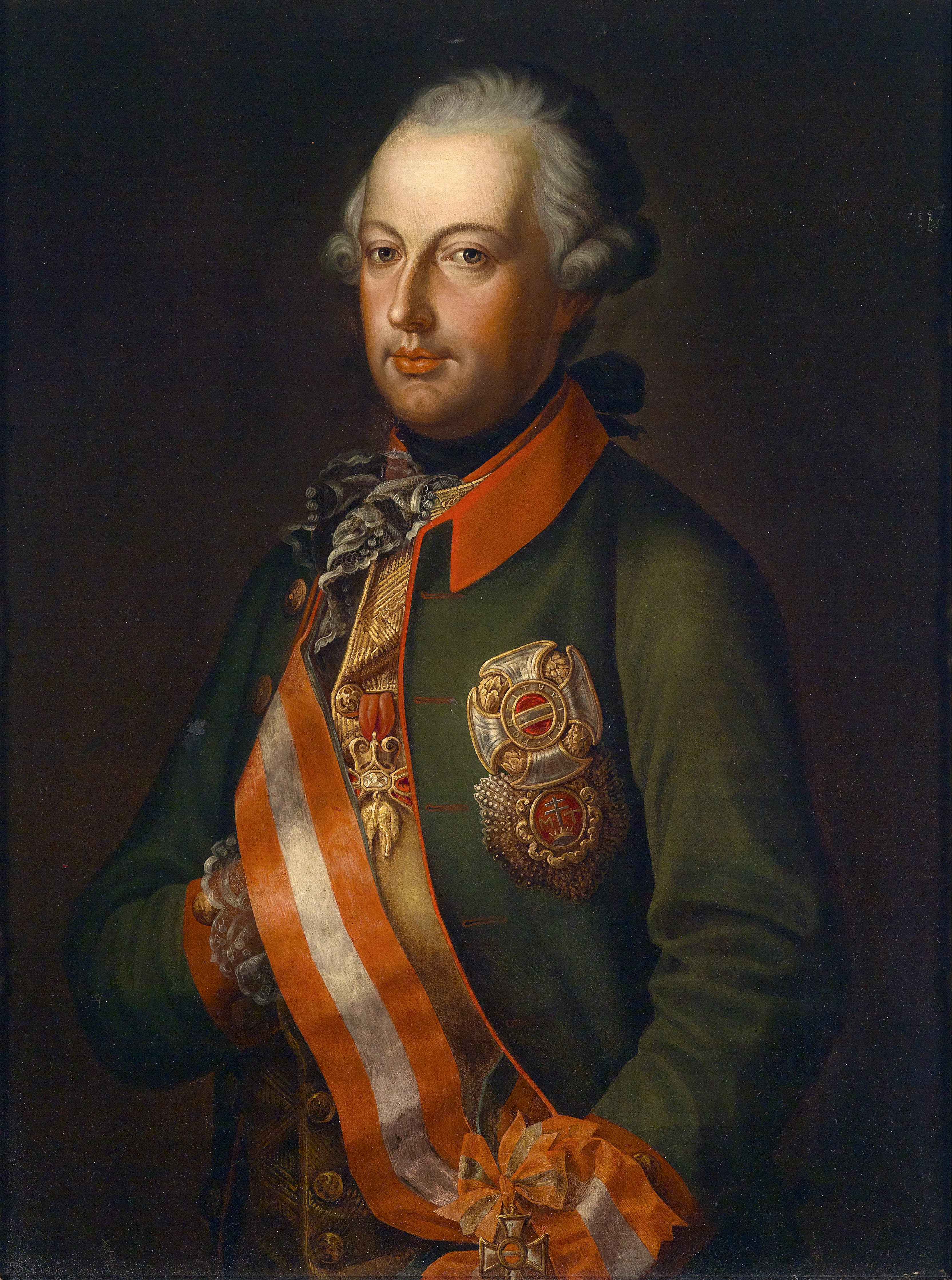 Kaiser Joseph II. in Uniform mit Ordensschmuck